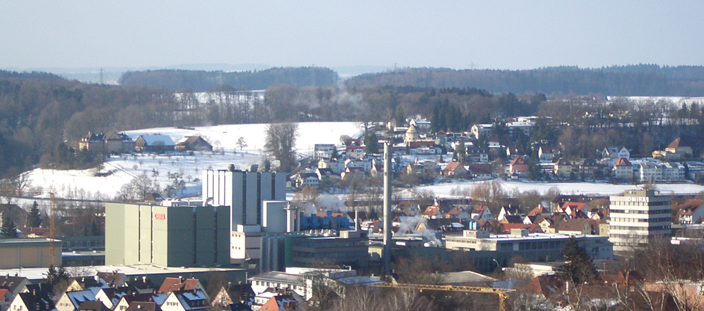 Ravensburg, Germany: OMIRA dairy (Oberland Milchverwertung Ravensburg)